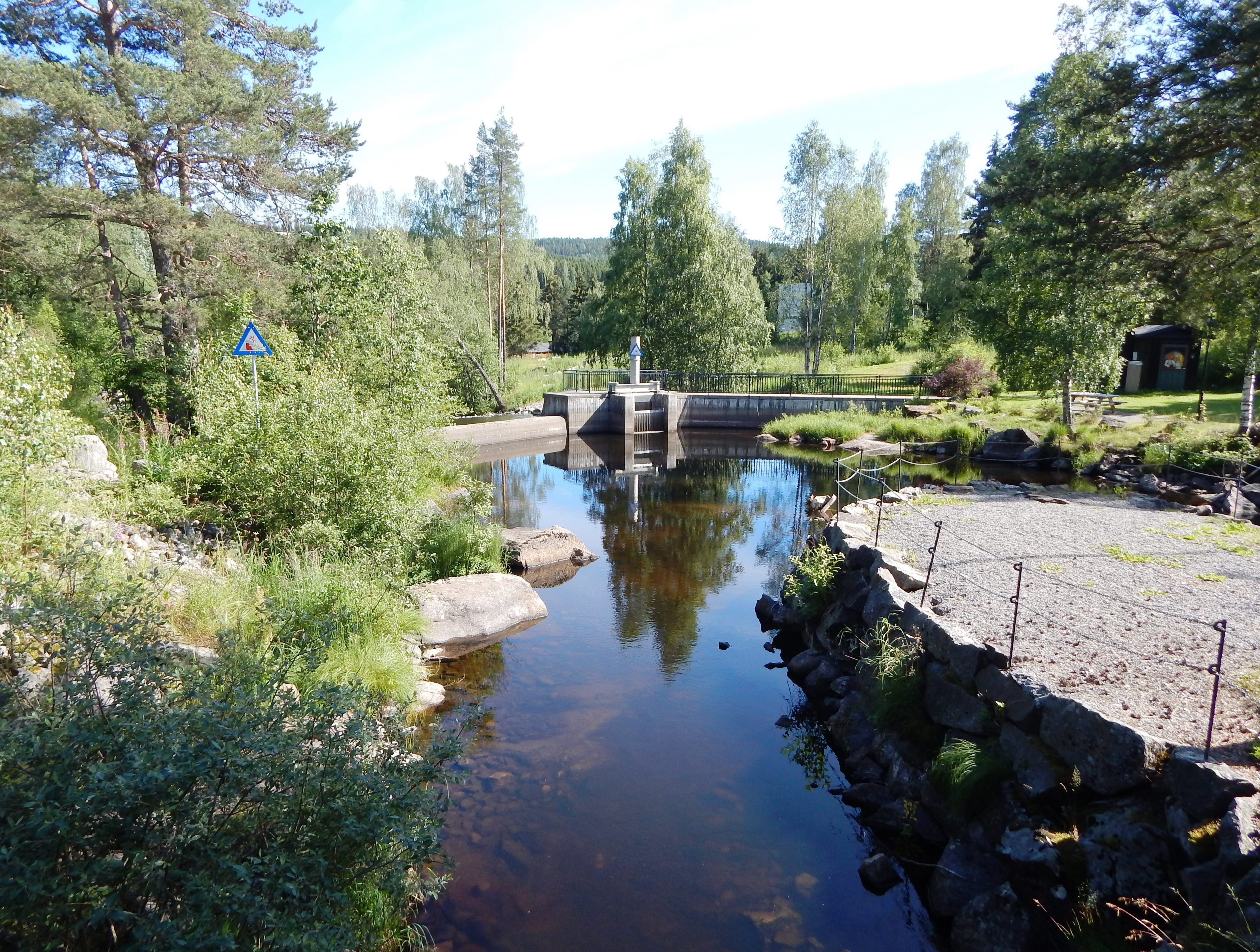 Moelva begynner ved demningen på Næroset.